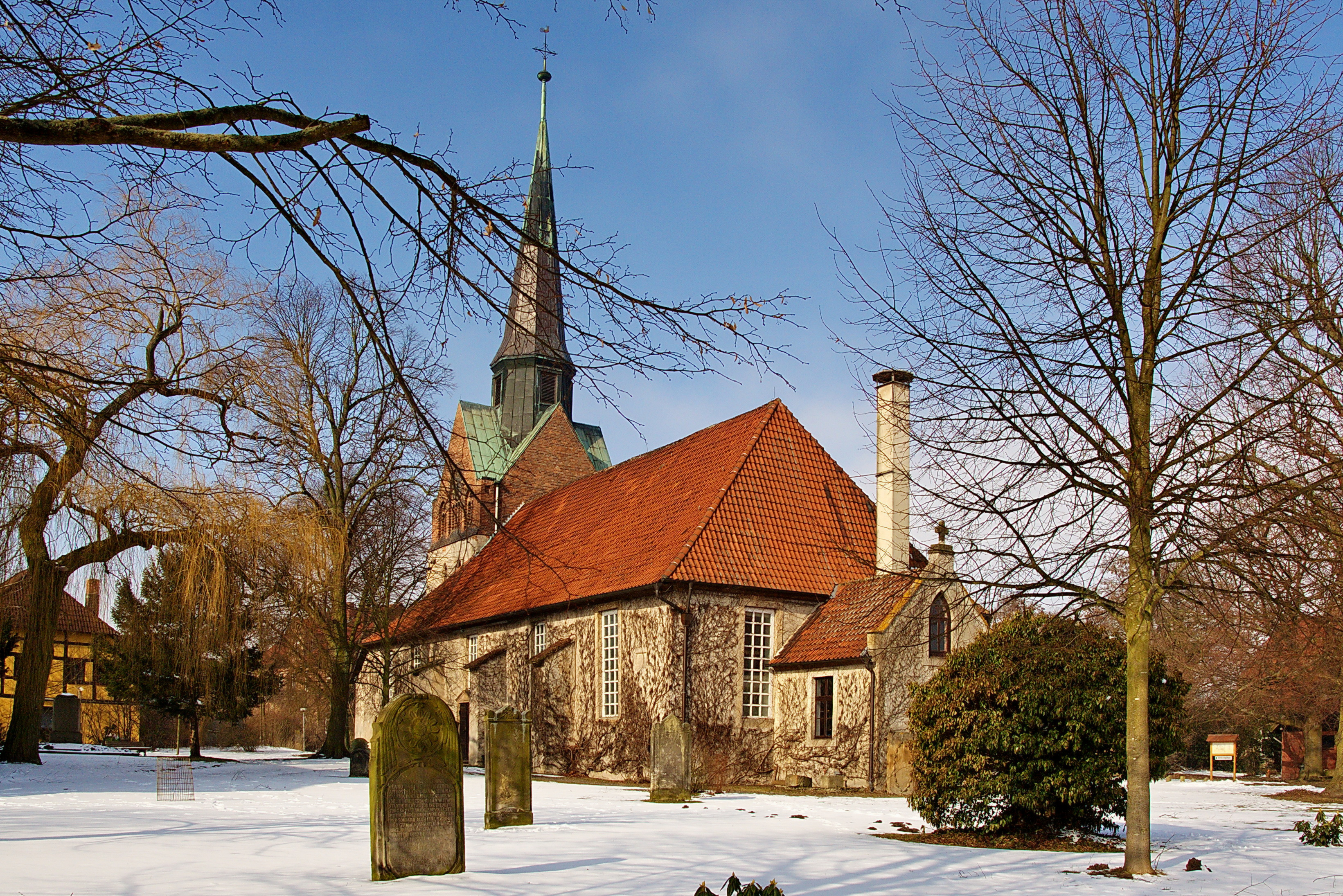 St.-Martins-Kirche zu Sievershausen (Lehrte), Niedersachsen, Deutschland